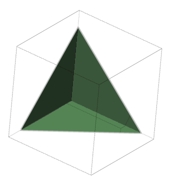 Geometrische Beschreibung eines Winkelreflektors